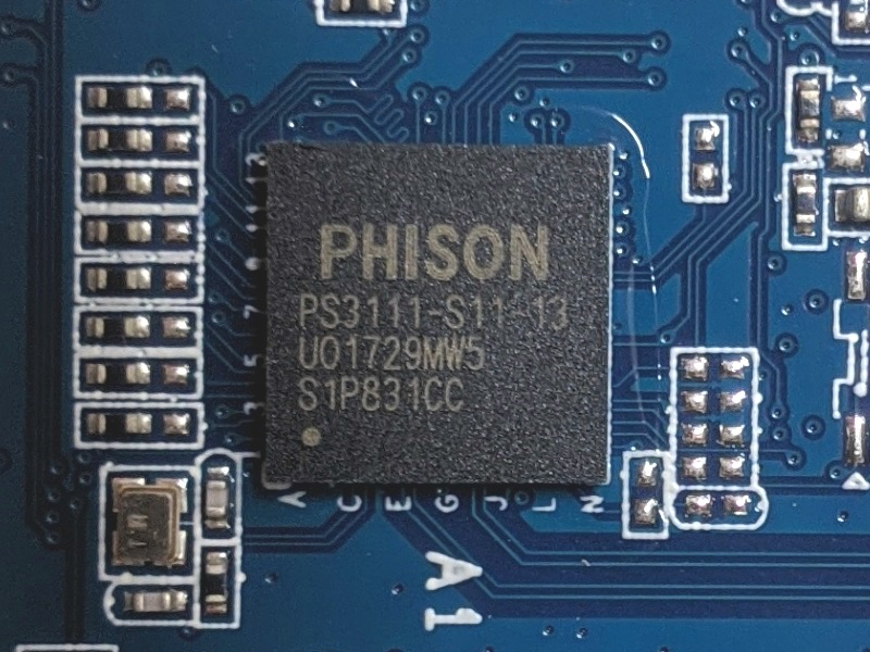 Phison Electronics PS3111-S11 DRAM-less SSD controller